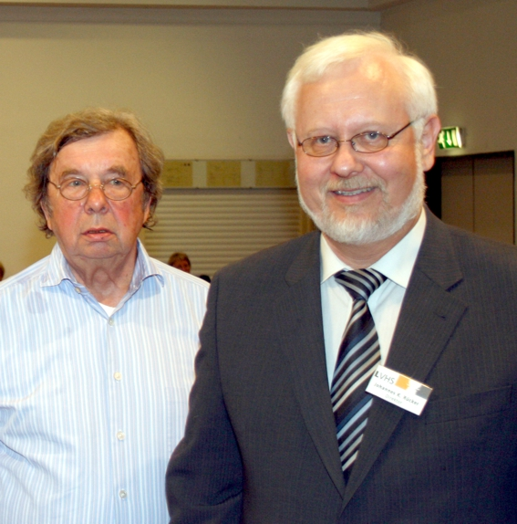 Johannes K. Rücker und Prof. Hellmut Karasek in der Katholischen Landvolkshochschule Freckenhorst